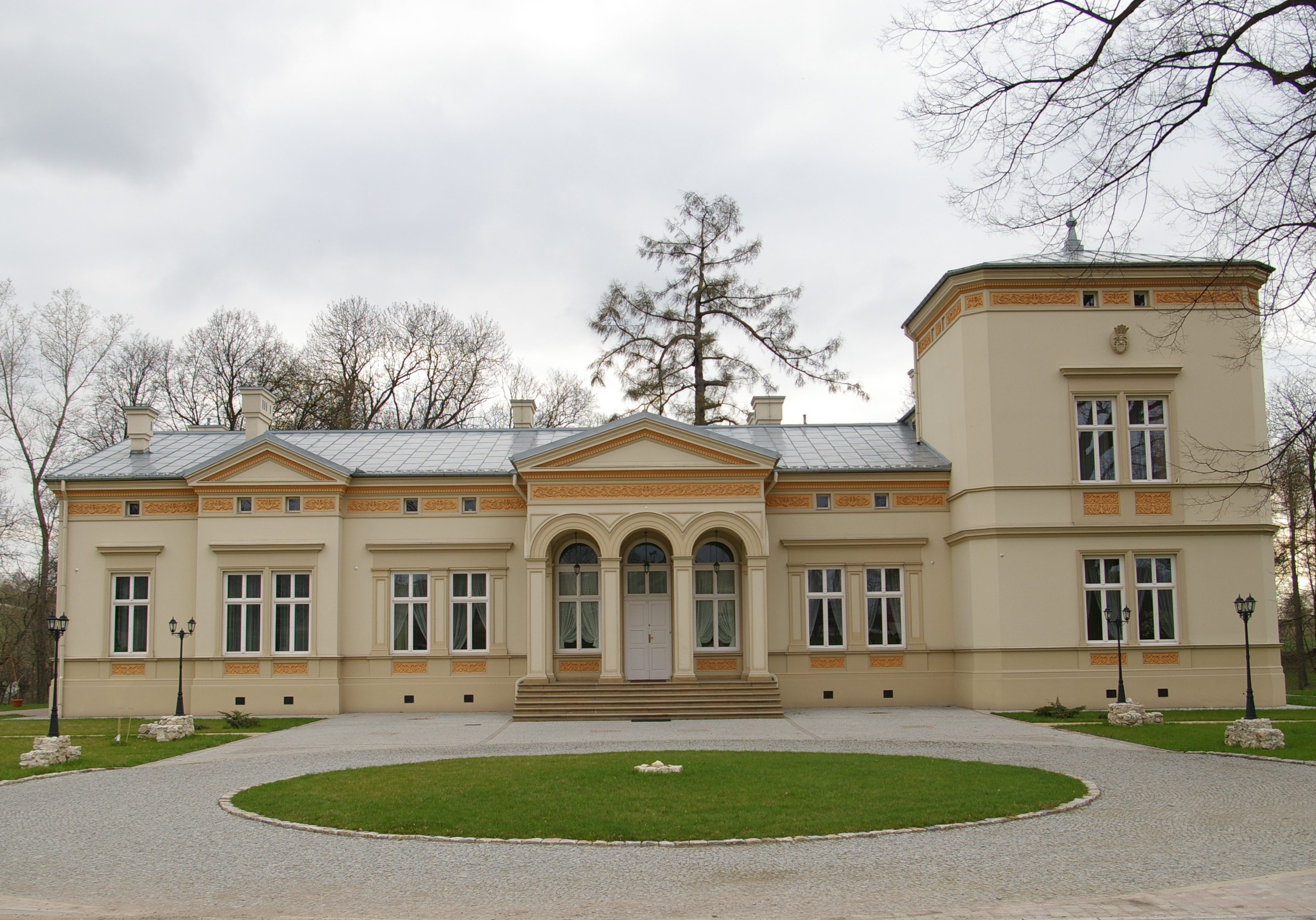 Pałac Wężyków w Minodze